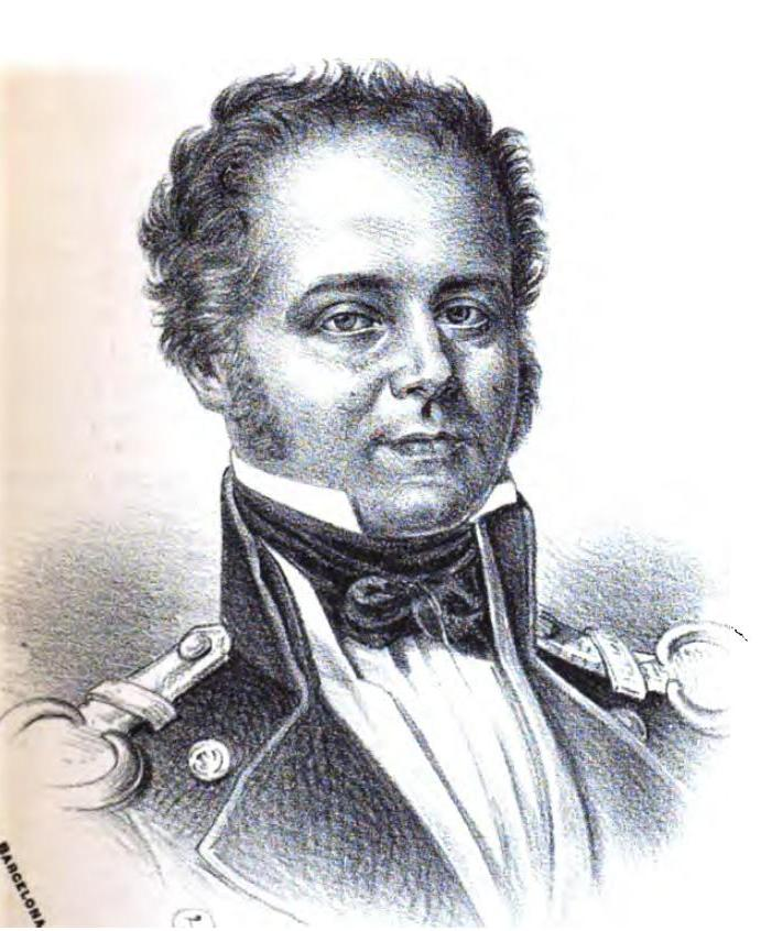 Don Carlos Guillermo Wooster -Charles Whiting Wooster- (1780-1849).